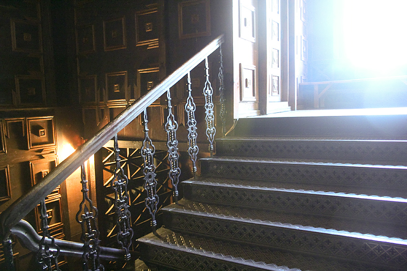 Drahomanov street